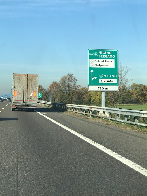 Raccordo per A35 in A4 direzione Milano